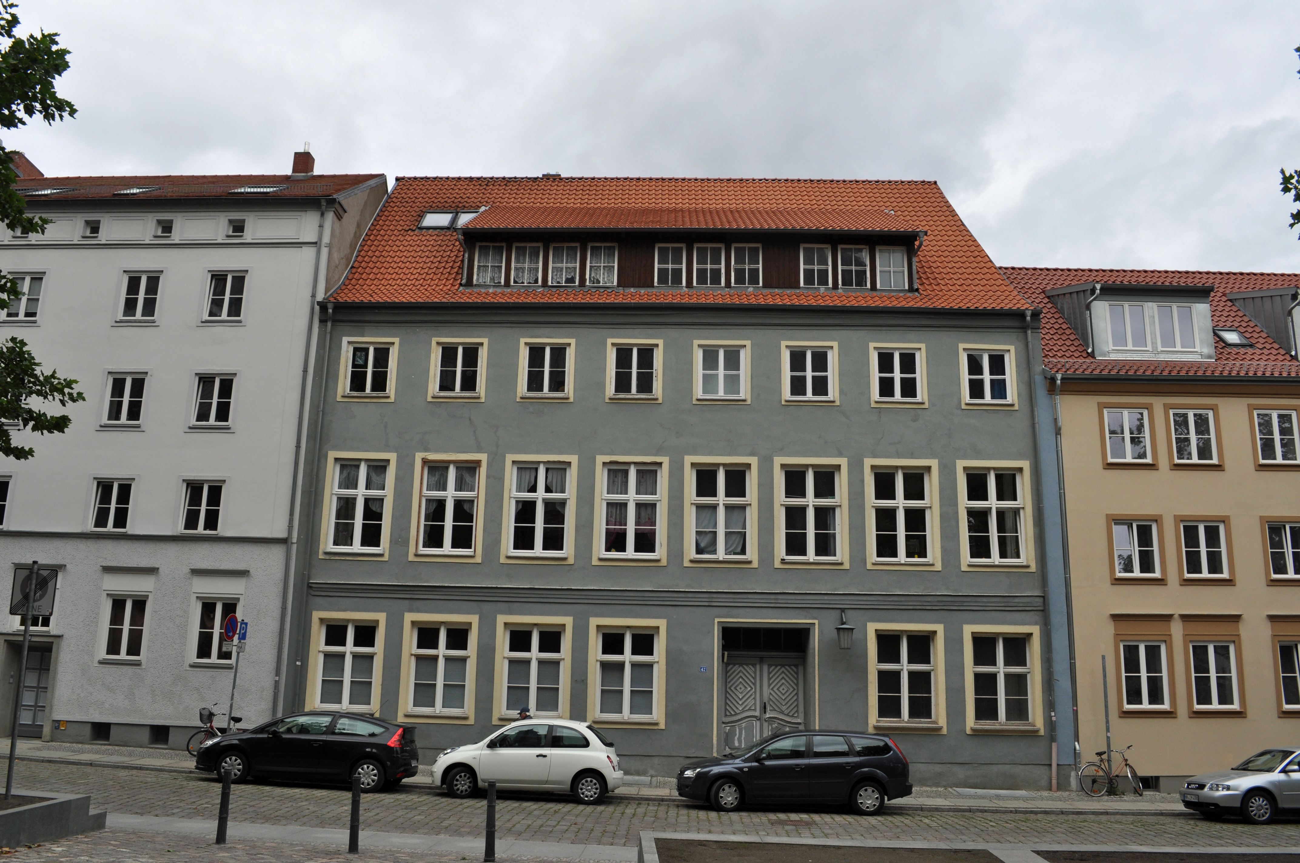 Stralsund, Semlower Straße 42 (2012-09-15), by Klugschnacker in Wikipedia